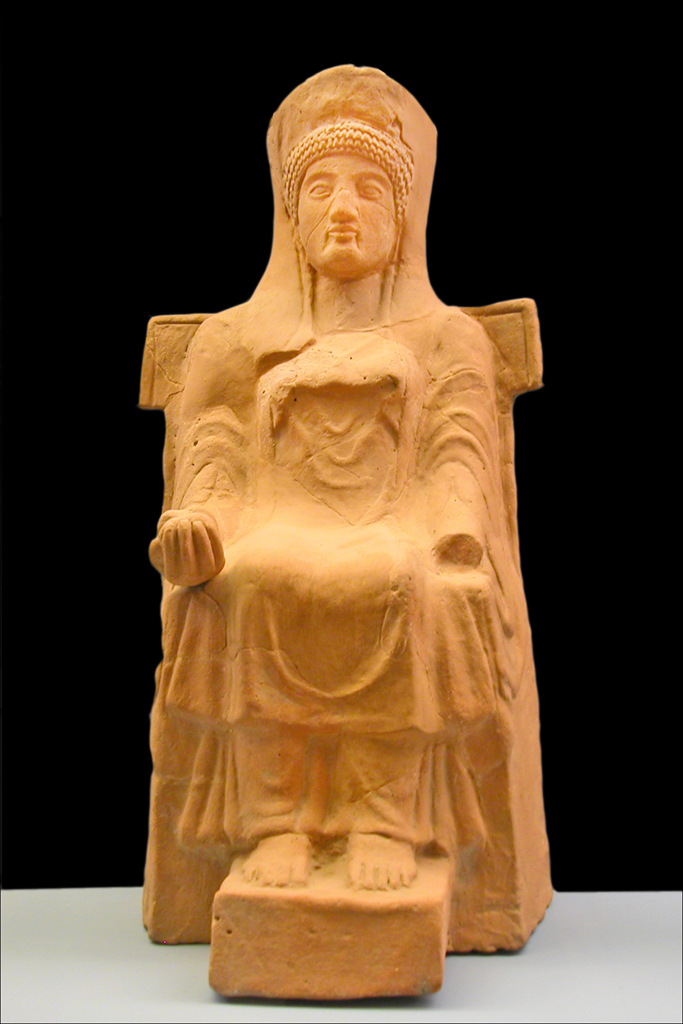 La déesse Héra La Déesse Héra tient une grenade dans la main droite, symbole de fertilité. La vierge Marie est également représentée dans la région de Paestum avec des grenades dans les mains. Site de l'auteur sur Paestum Site du musée de Paestum Photo prise par l'auteur en 2004 publiée sur des sites personnels hébergés par Free